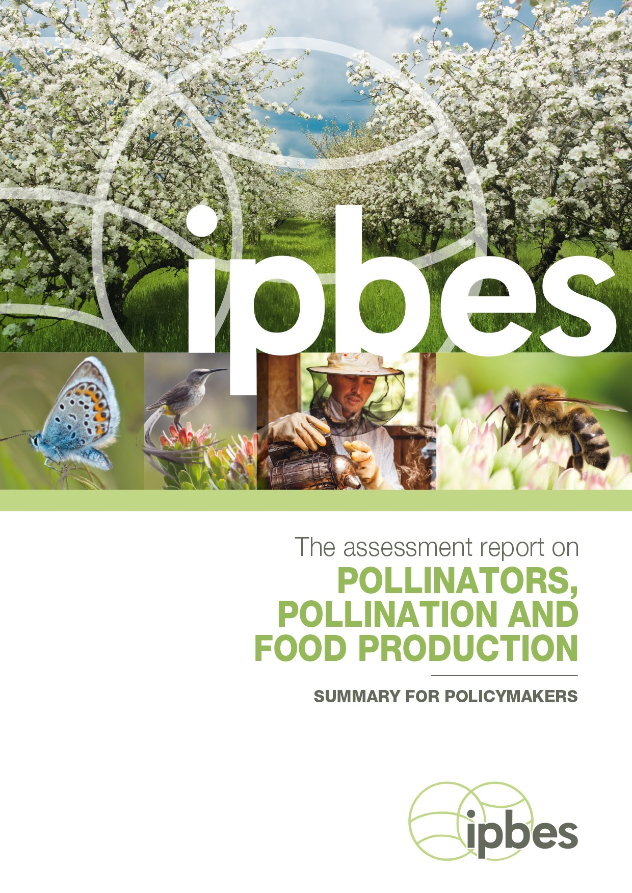 Carátula del Informe de evaluación sobre Polinizadores, Polinización y Producción de Alimentos (Resumen para los responsables de formular políticas) de la Plataforma Intergubernamental de Biodiversidad y Servicios Ecosistémicos de las Naciones Unidas durante la sesión plenaria IPBES no. 4 llevada a cabo del 22 al 28 de febrero del 2016 en Kuala Lumpur.